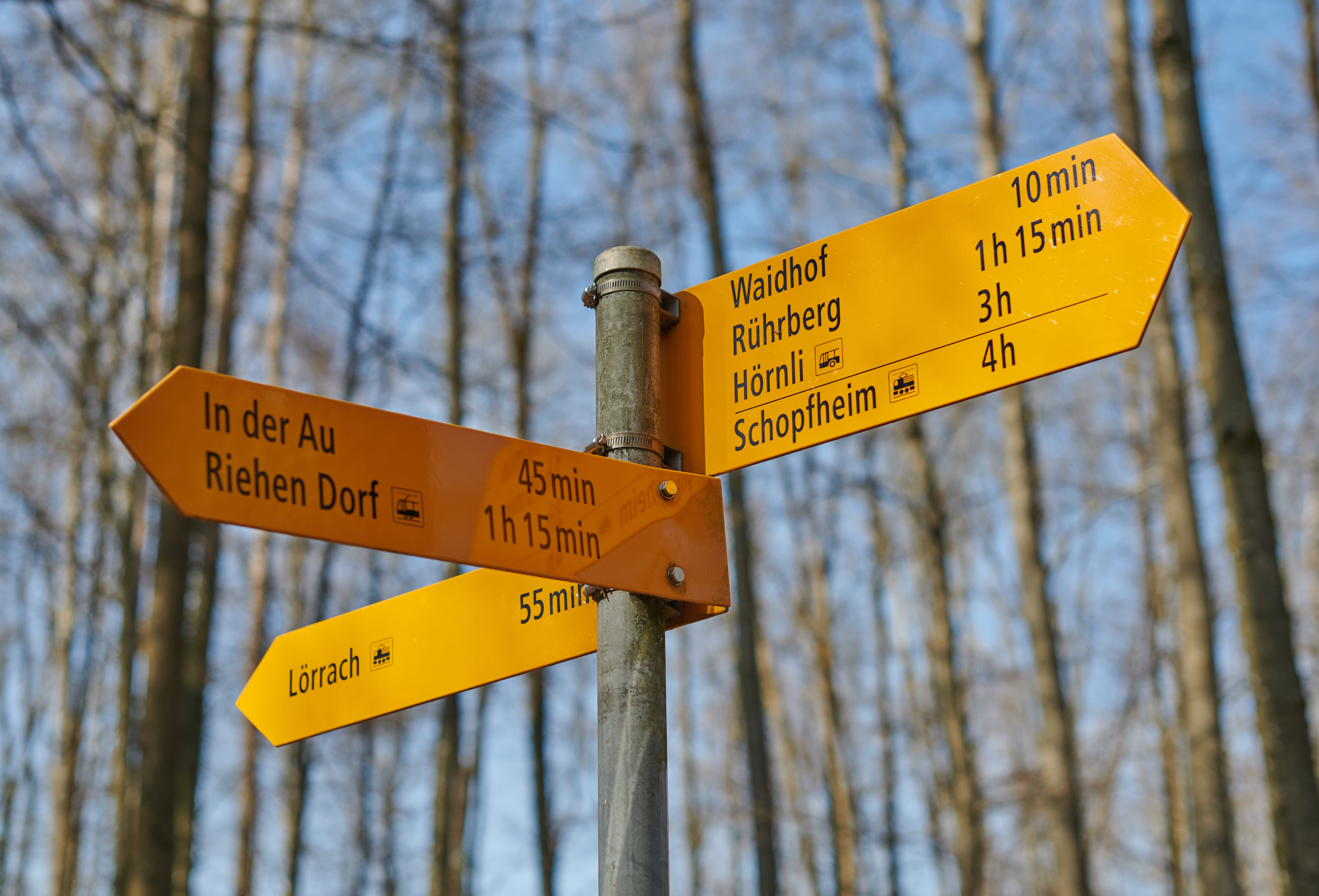 Eiserne Hand: Wanderweg Richtungsschild